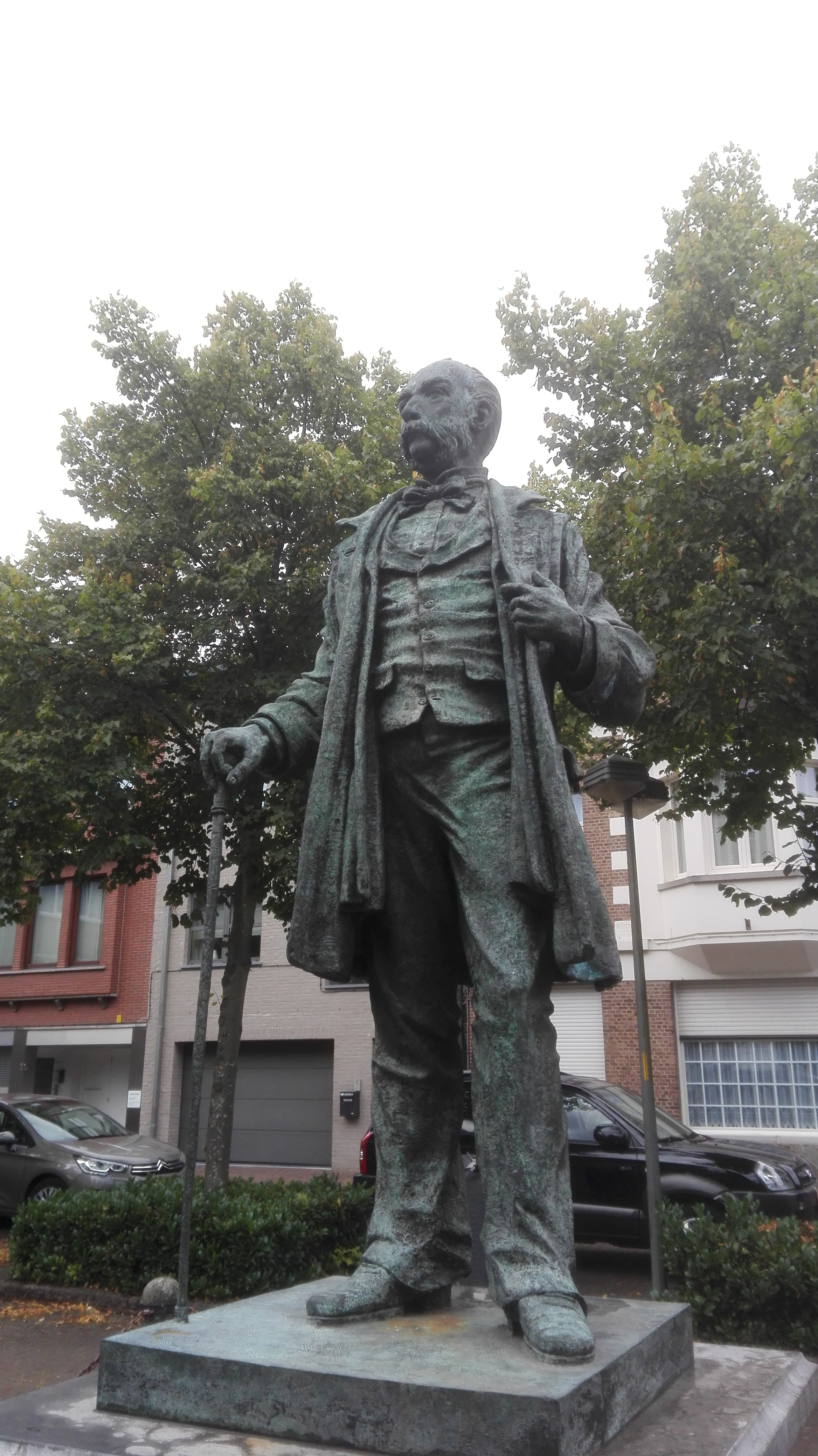 alphonse della faille de leverghem, standbeeld Maria-ter-Heide, Zegeplein